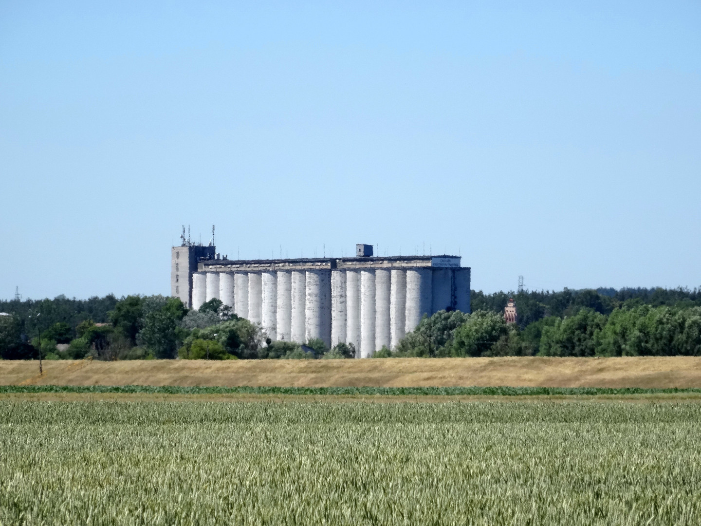 Miasto Świecie, elewatory zbożowe